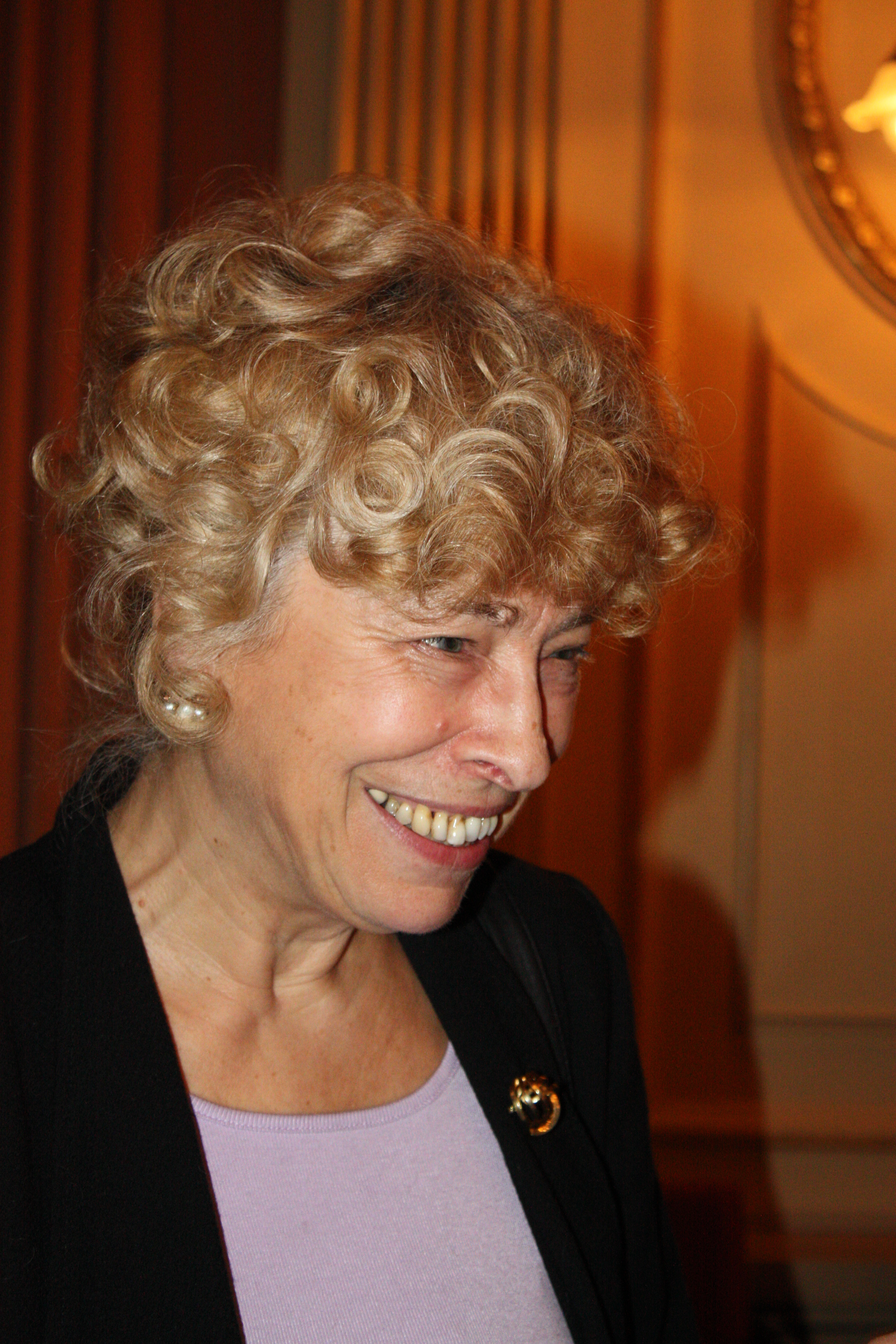 Gesine Schwan auf dem Neujahrsempfang der Heidelberger Grünen